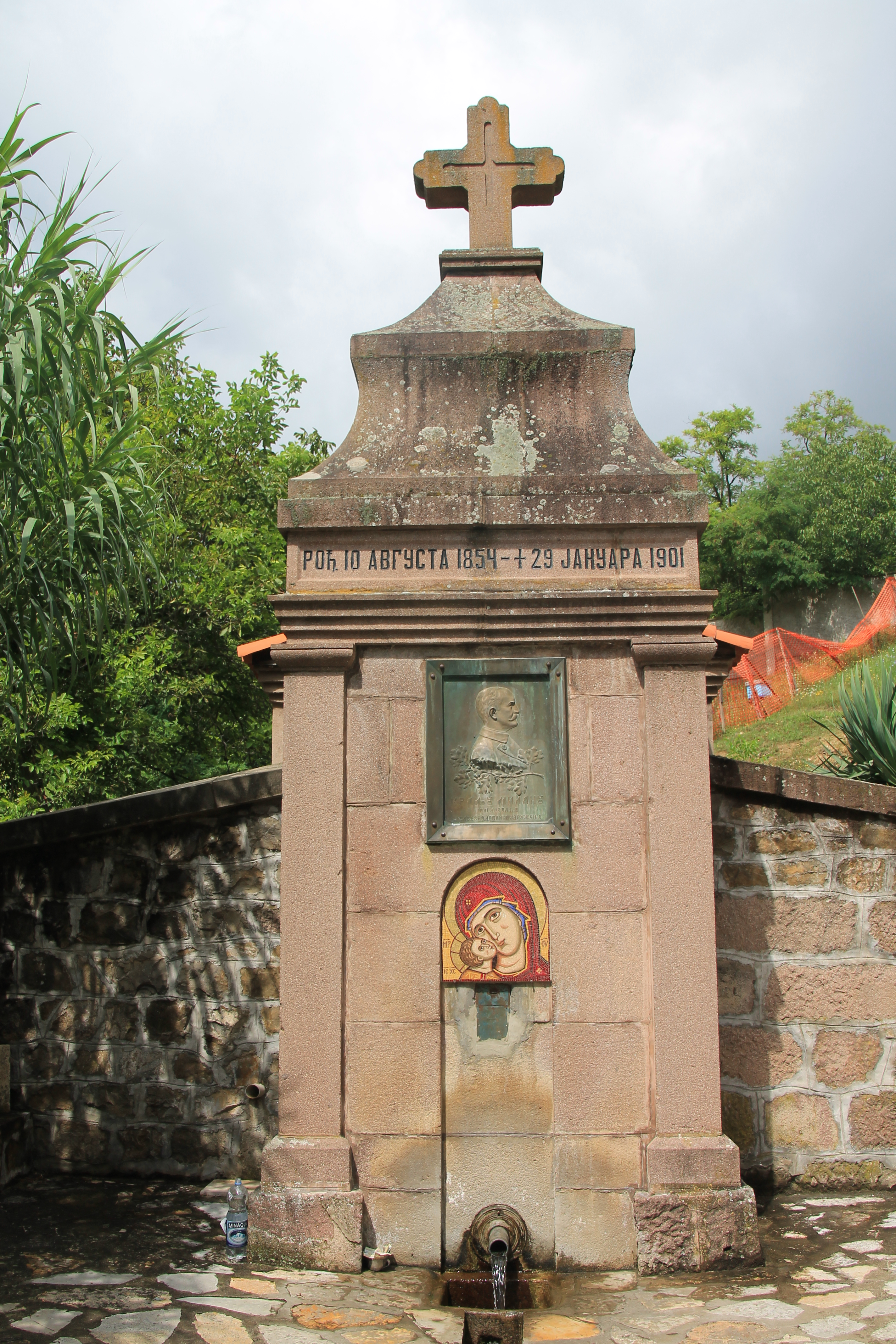 Spomen česma u Divostinu